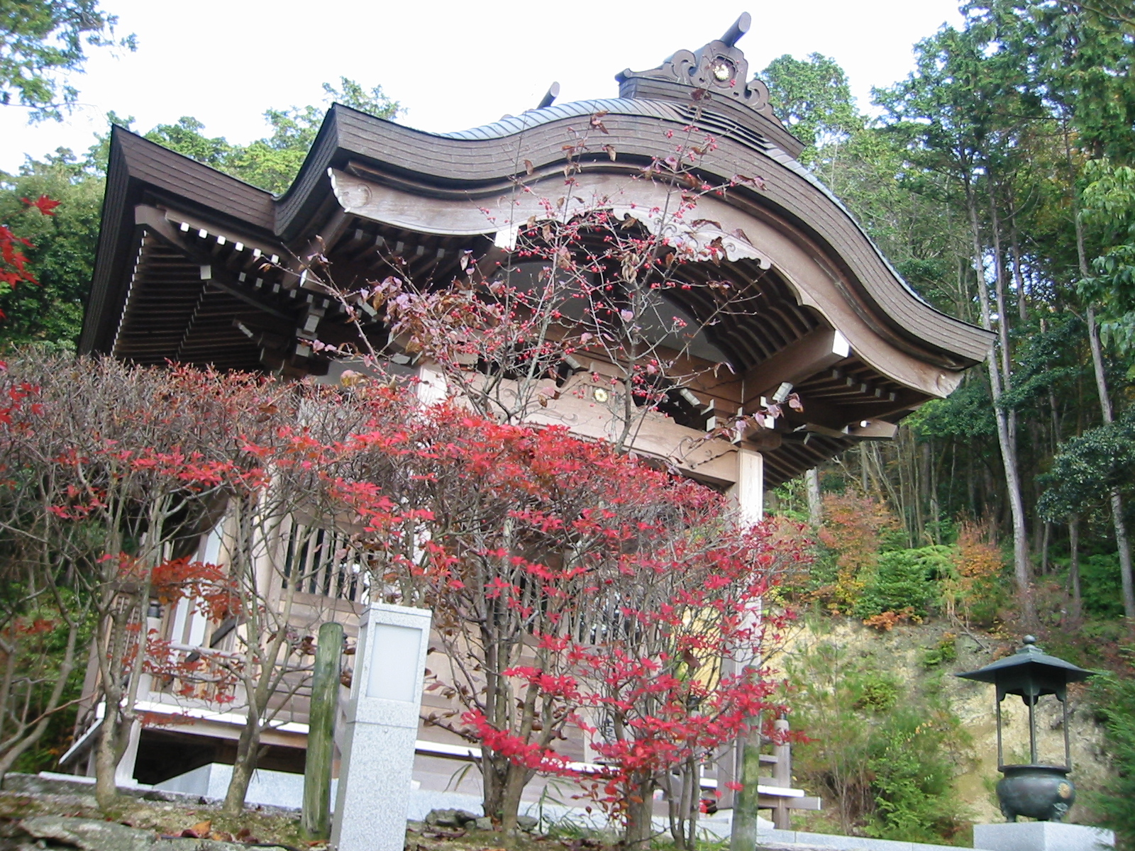 神戸 獨鈷山鏑射寺 弁天堂